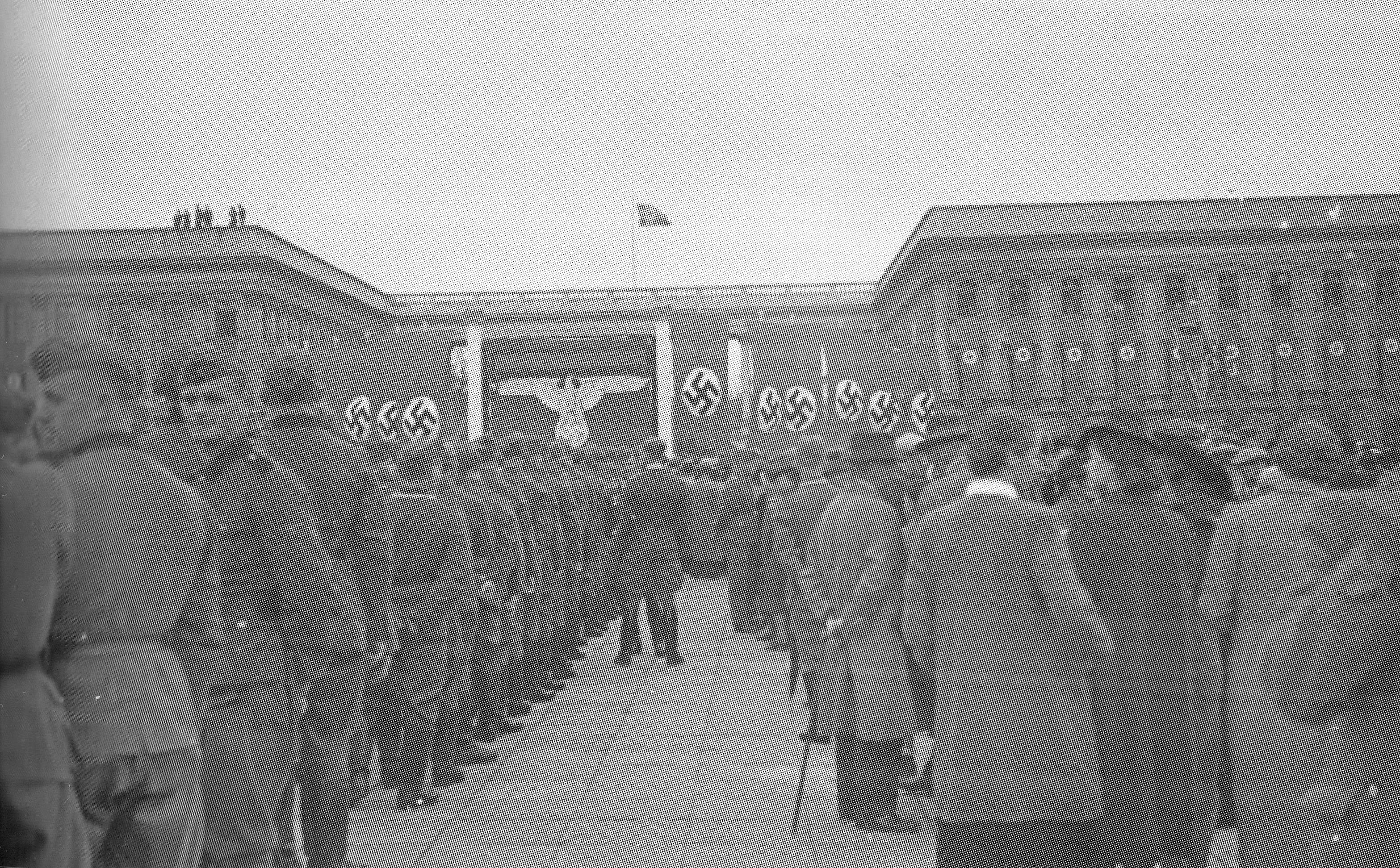 Uroczystość nadania nazwy placowi Marszałka Józefa Piłsudskiego w Warszawie Adolf-Hitler-Platz